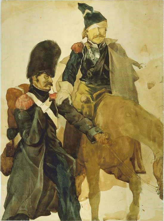 Rückkehr von Russland (Französische Retirade) 1813